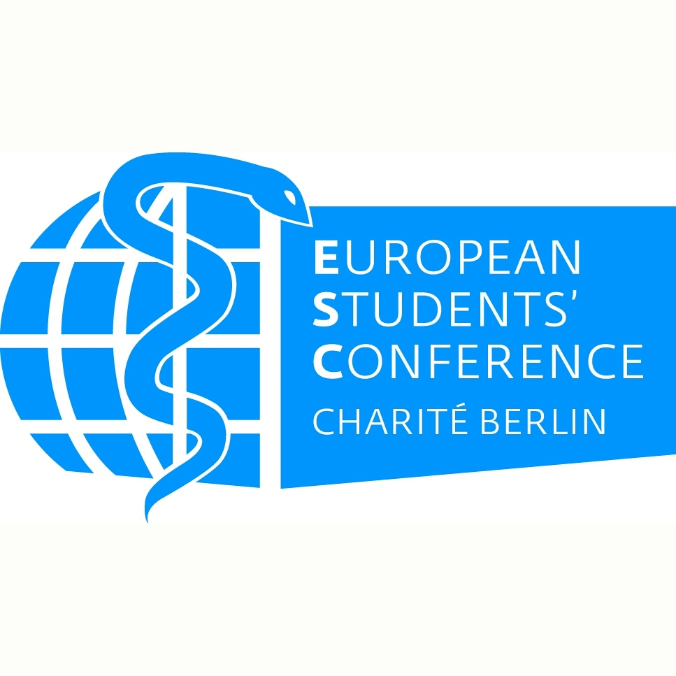 Logo der ESC